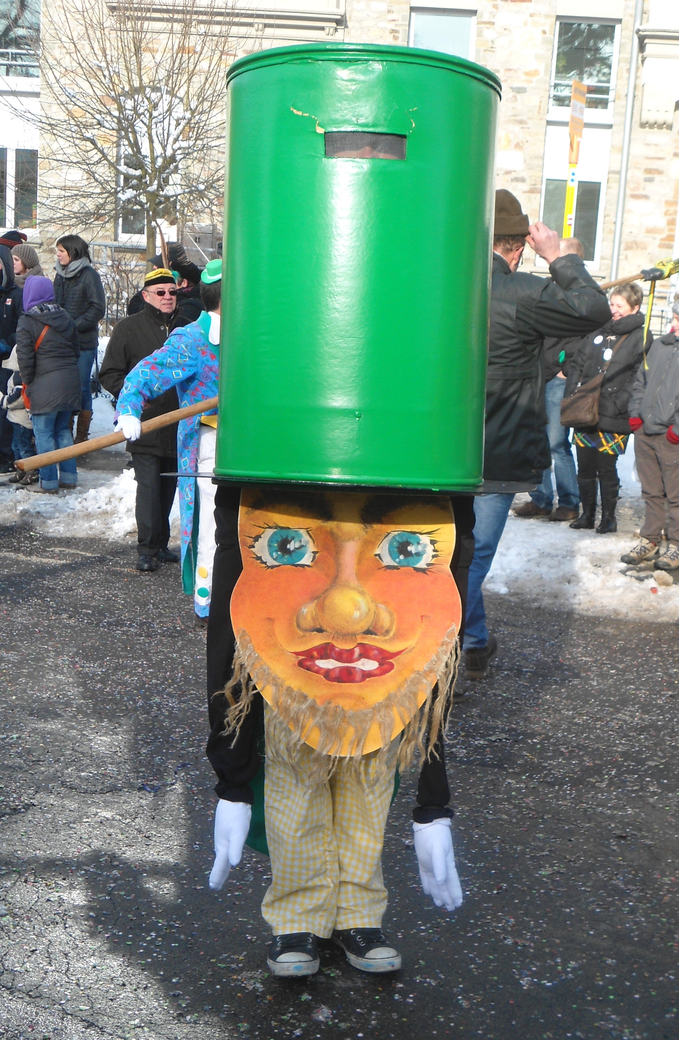 Cwarmê Malmedy Lu Sotè